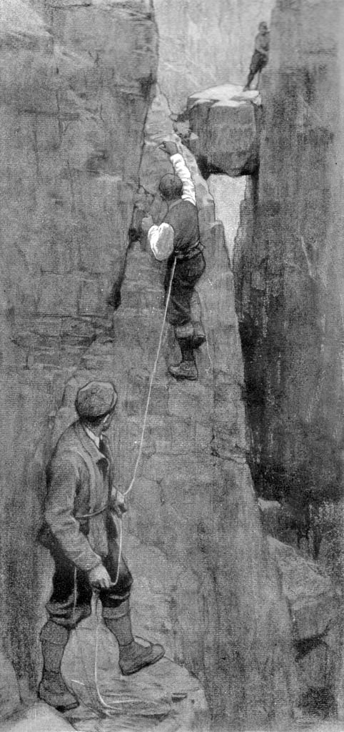 Dolomitenklettern